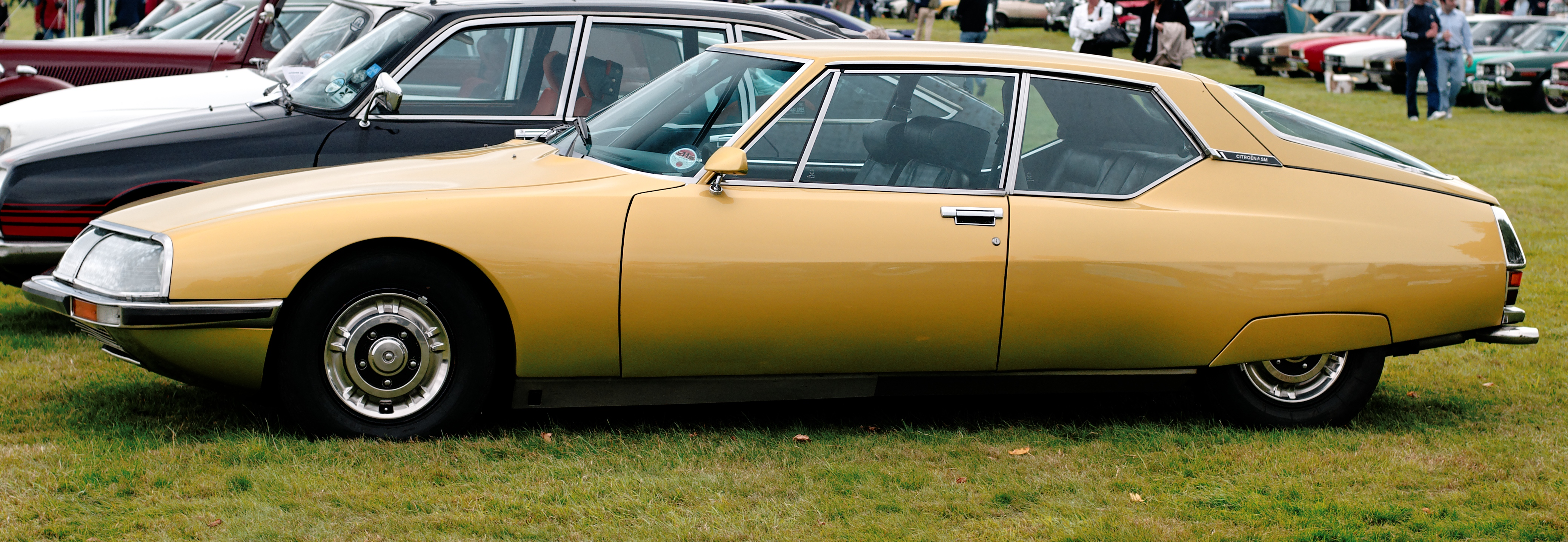 Citroen SM.